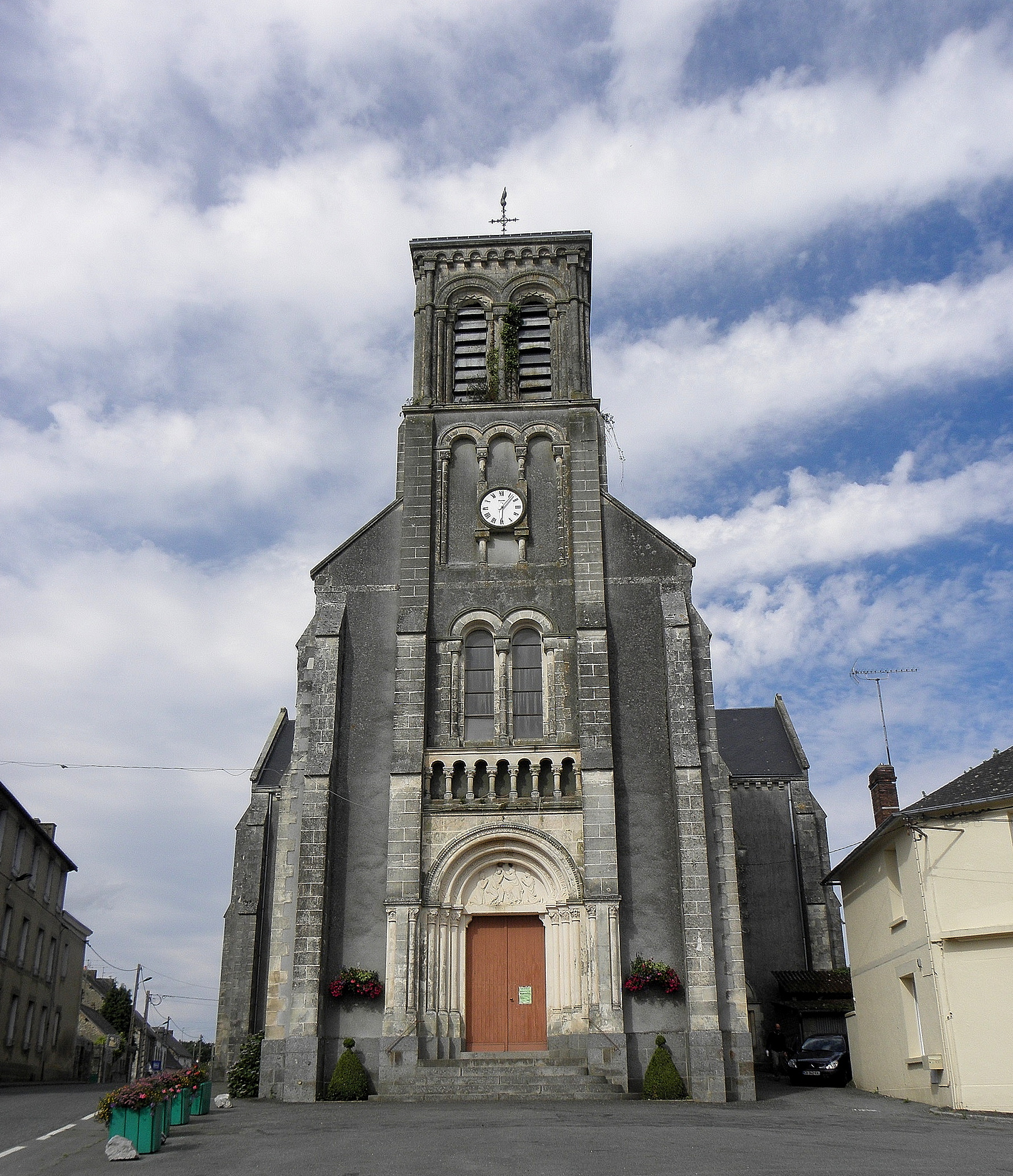 Église Notre-Dame-de-l'Annonciation de La Chapelle-au-Riboul (53).